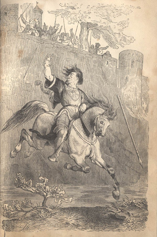 Illustration aus: Franz Trautmann, Eppelein von Gailingen, Frankfurt am Main 1852